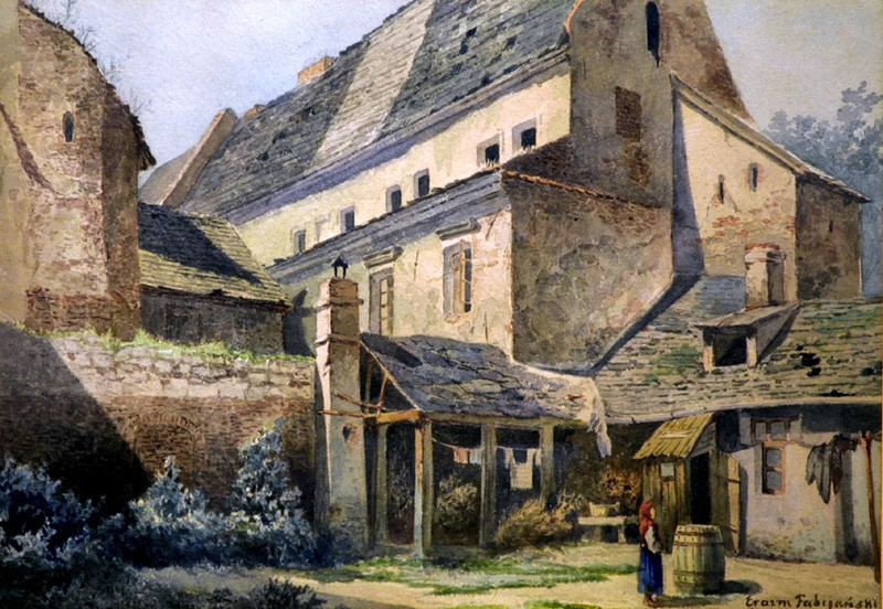 Zabudowania szpitala św. Ducha